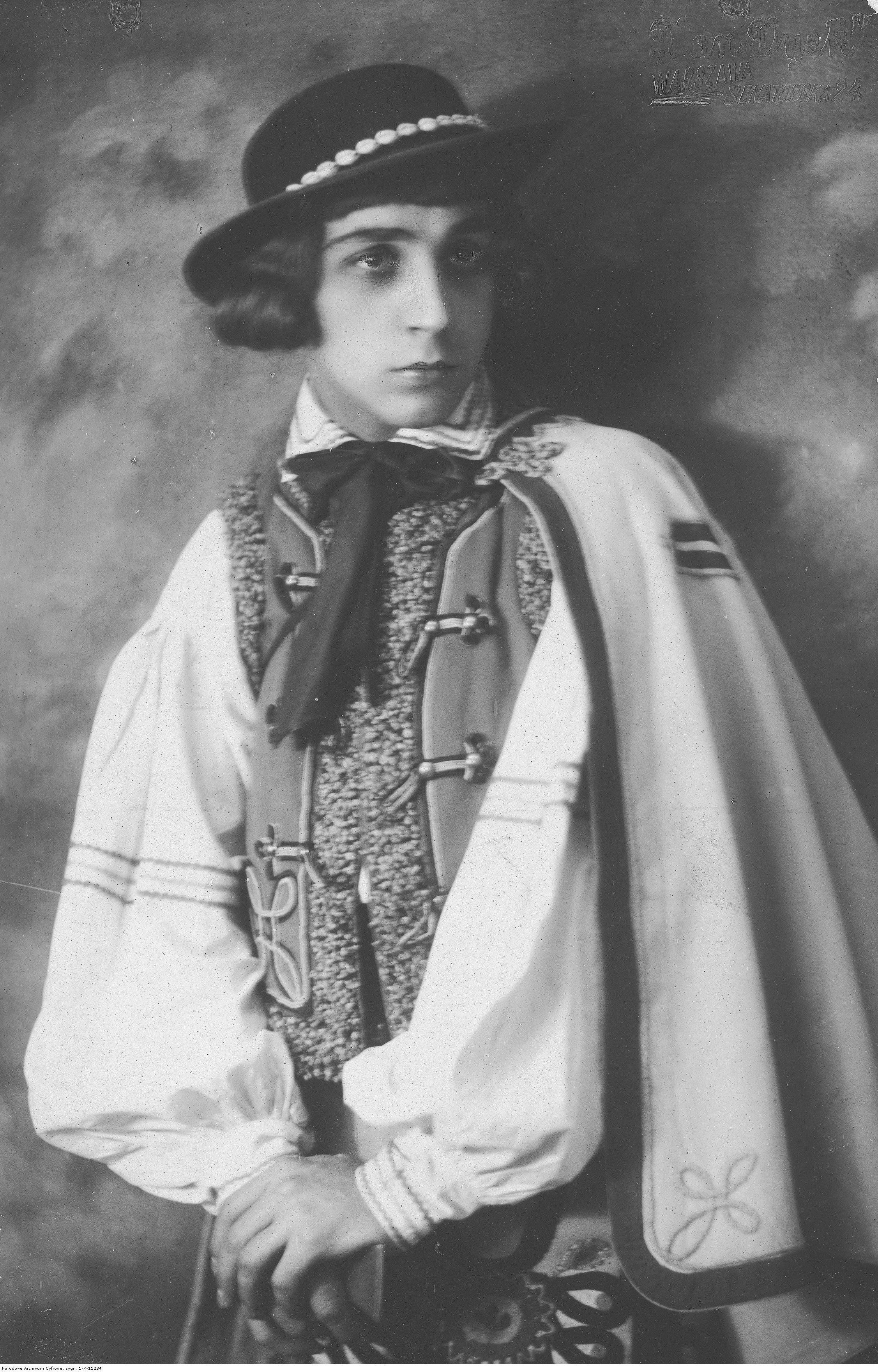 August Suzin, pseud. Gustaw Chorian, jako Jontek w jednej ze scen opery "Halka" Stanisława Moniuszki w Teatrze Wielkim w Warszawie.